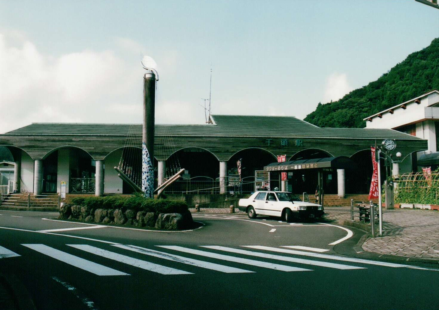 千頭駅(2009/08/15)